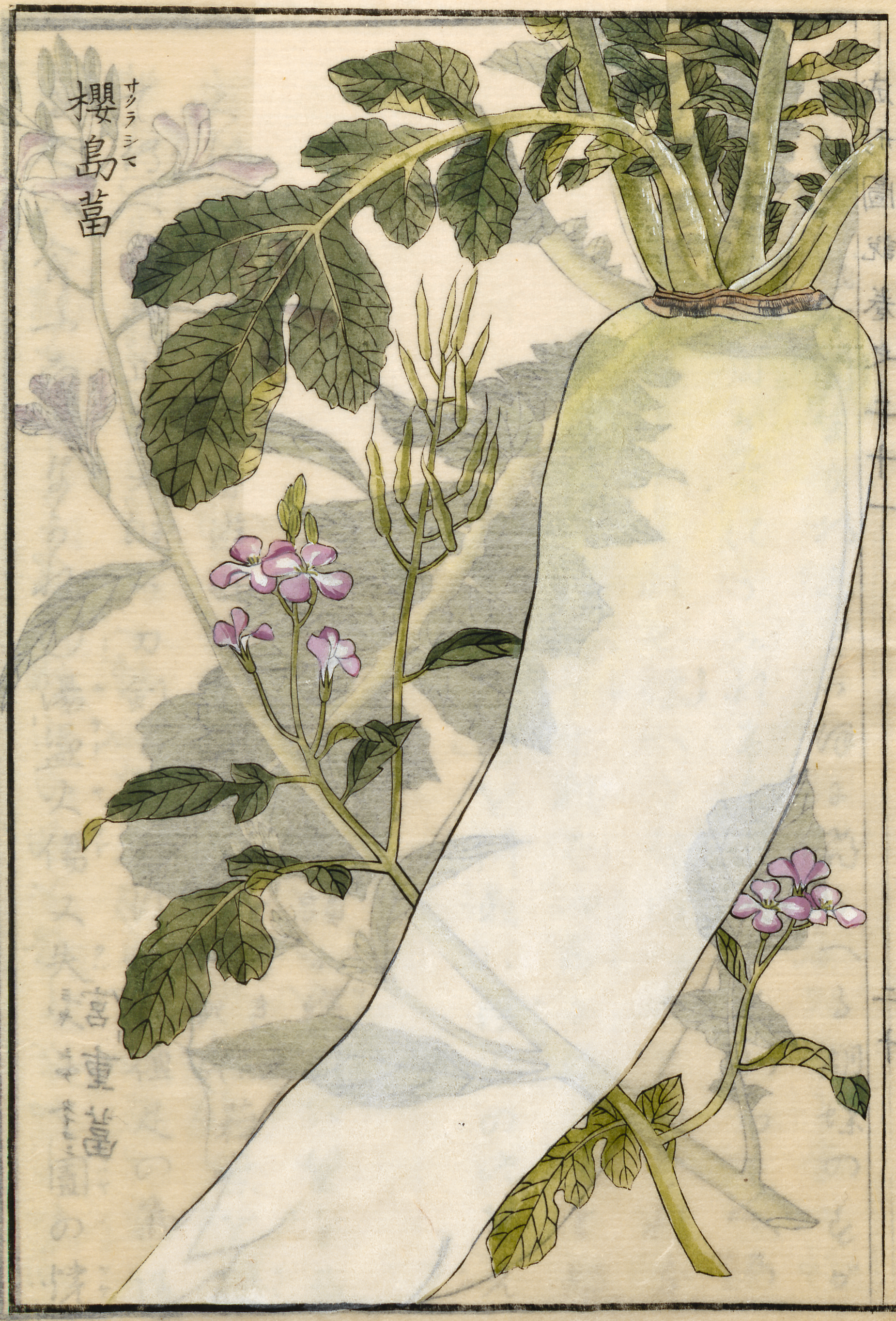 représentation du daikon sakurajima au XVIIIeme siécle